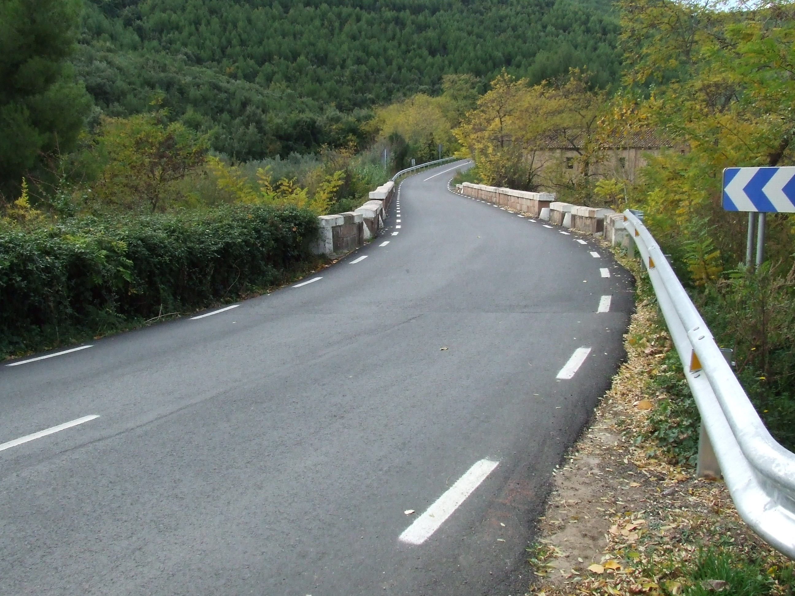 El Pont de Can Camp (Riells del Fai, Bigues i Riells, Vallès Oriental)